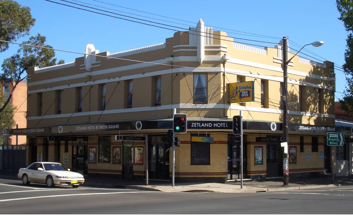 Zetland